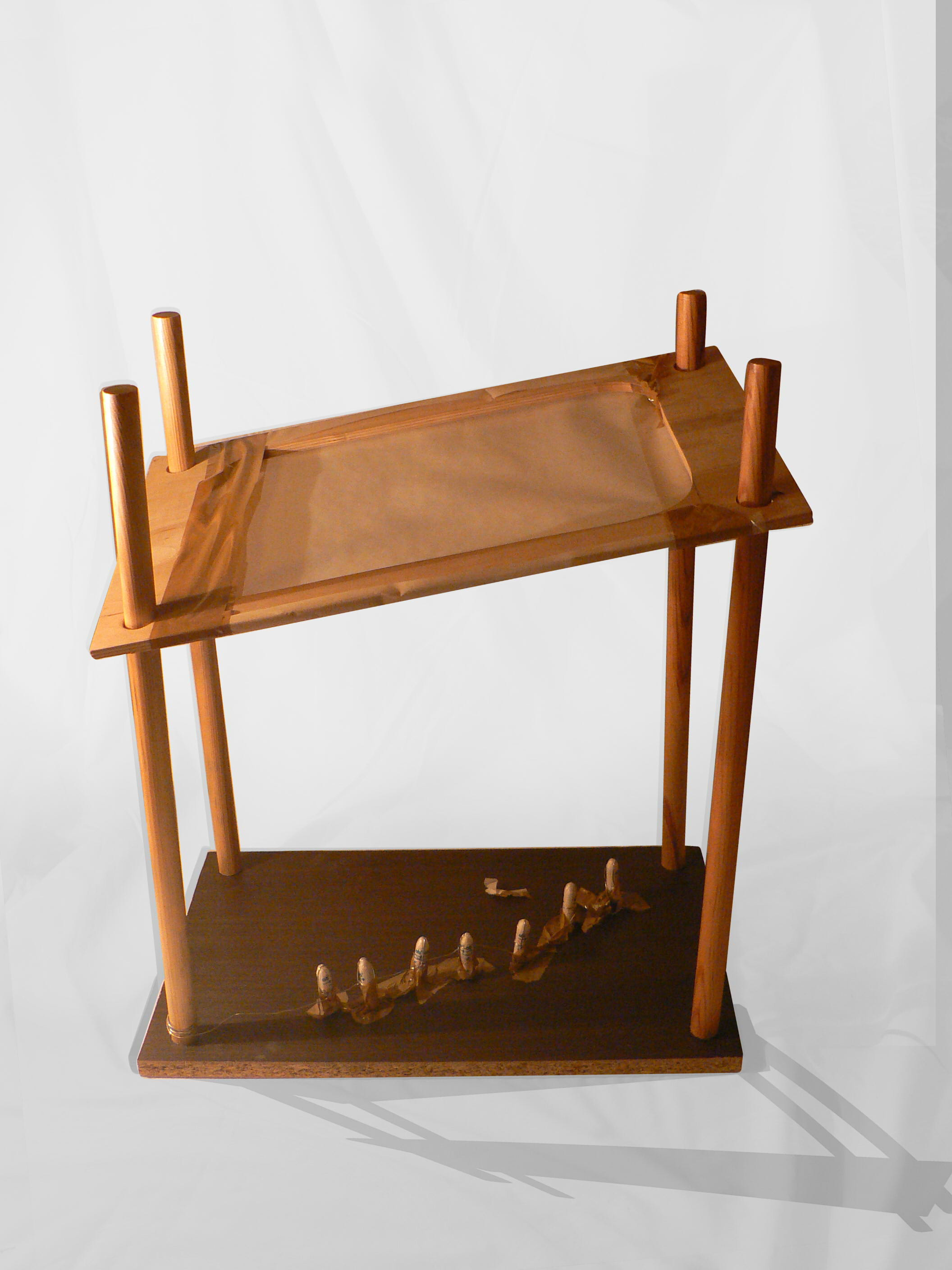 2016, fa, papír.